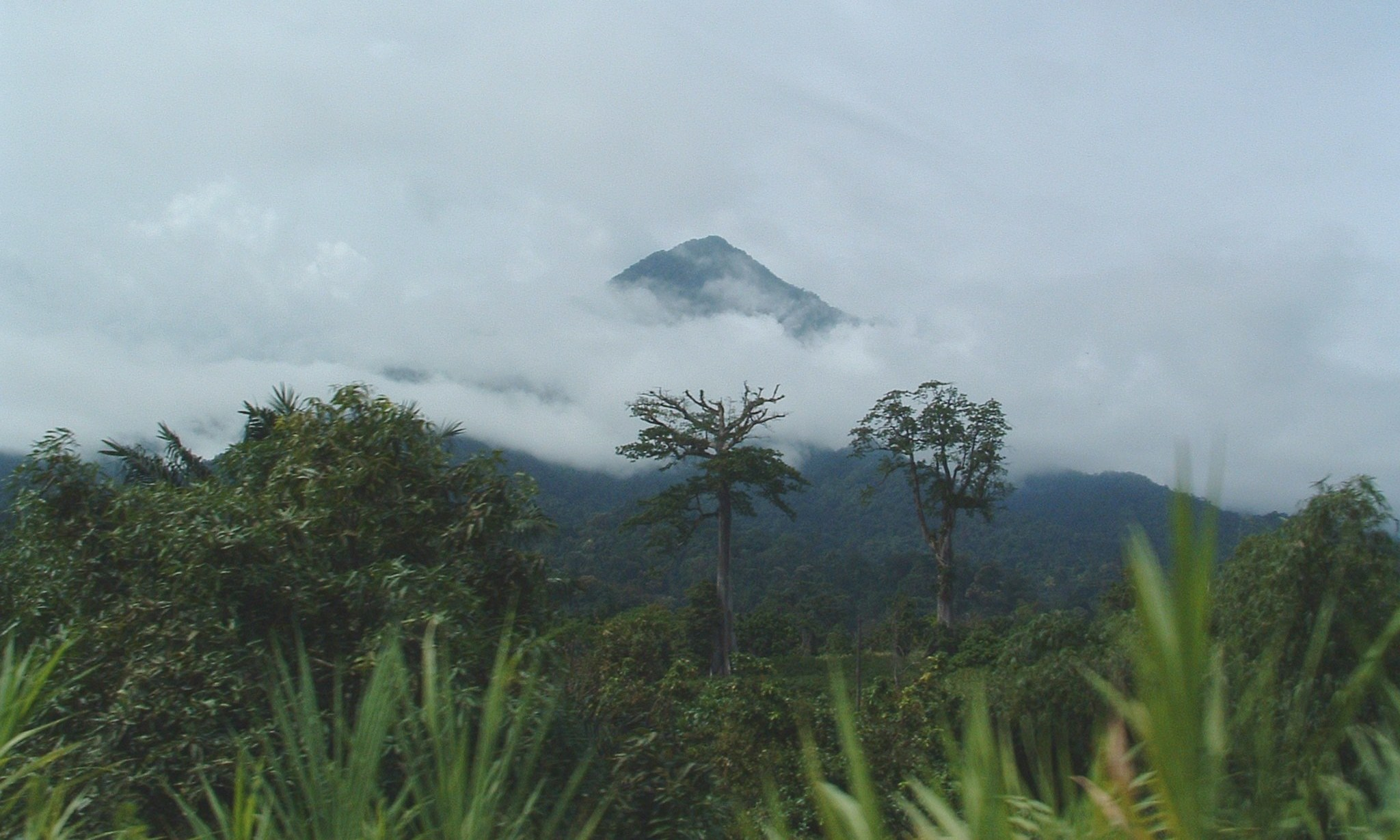 Vue du Mont-Cameroun à partir de la route de Limbe